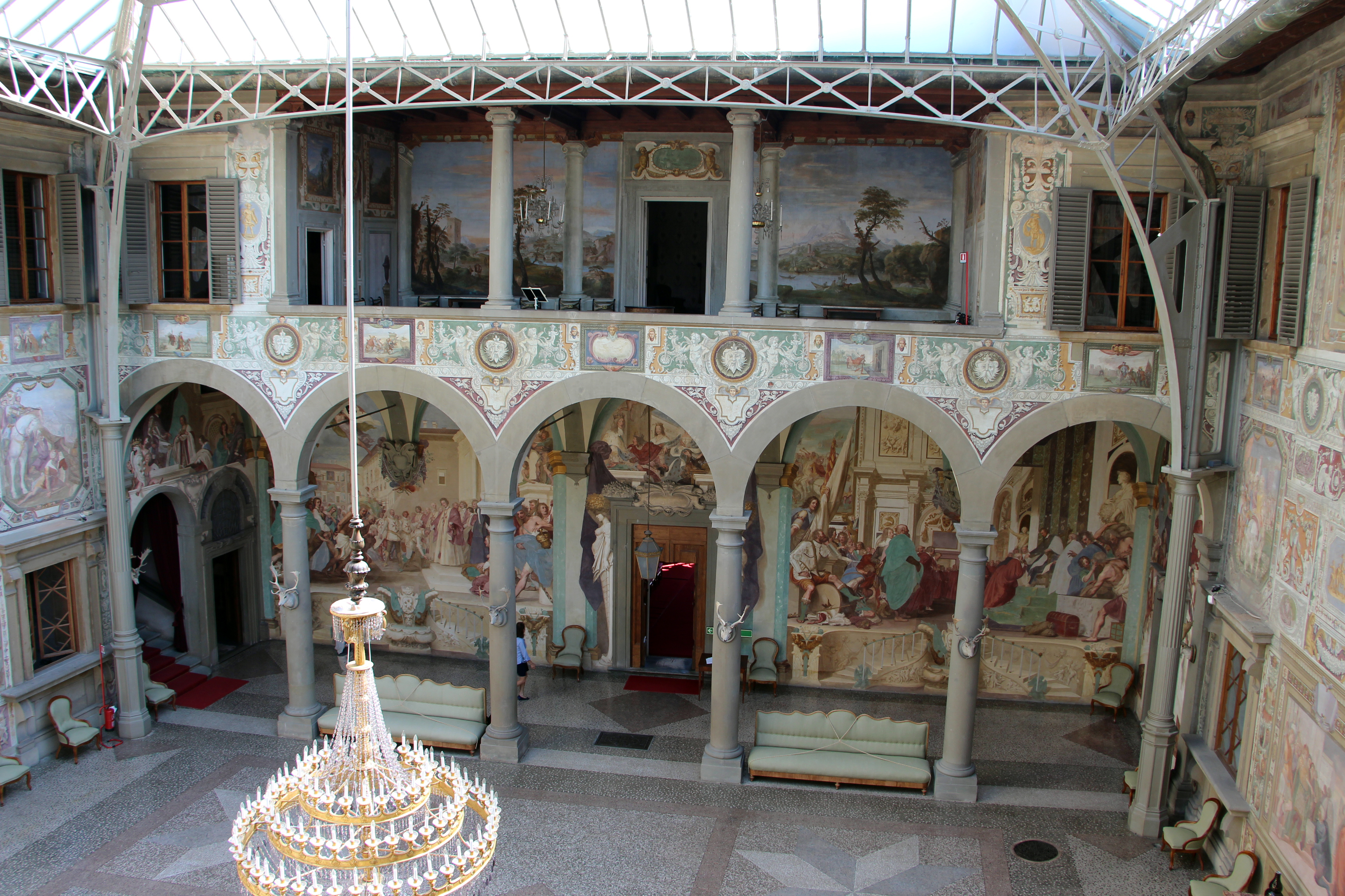 Villa medicea della Petraia - MIBAC This is a photo of a monument which is part of cultural heritage of Italy.